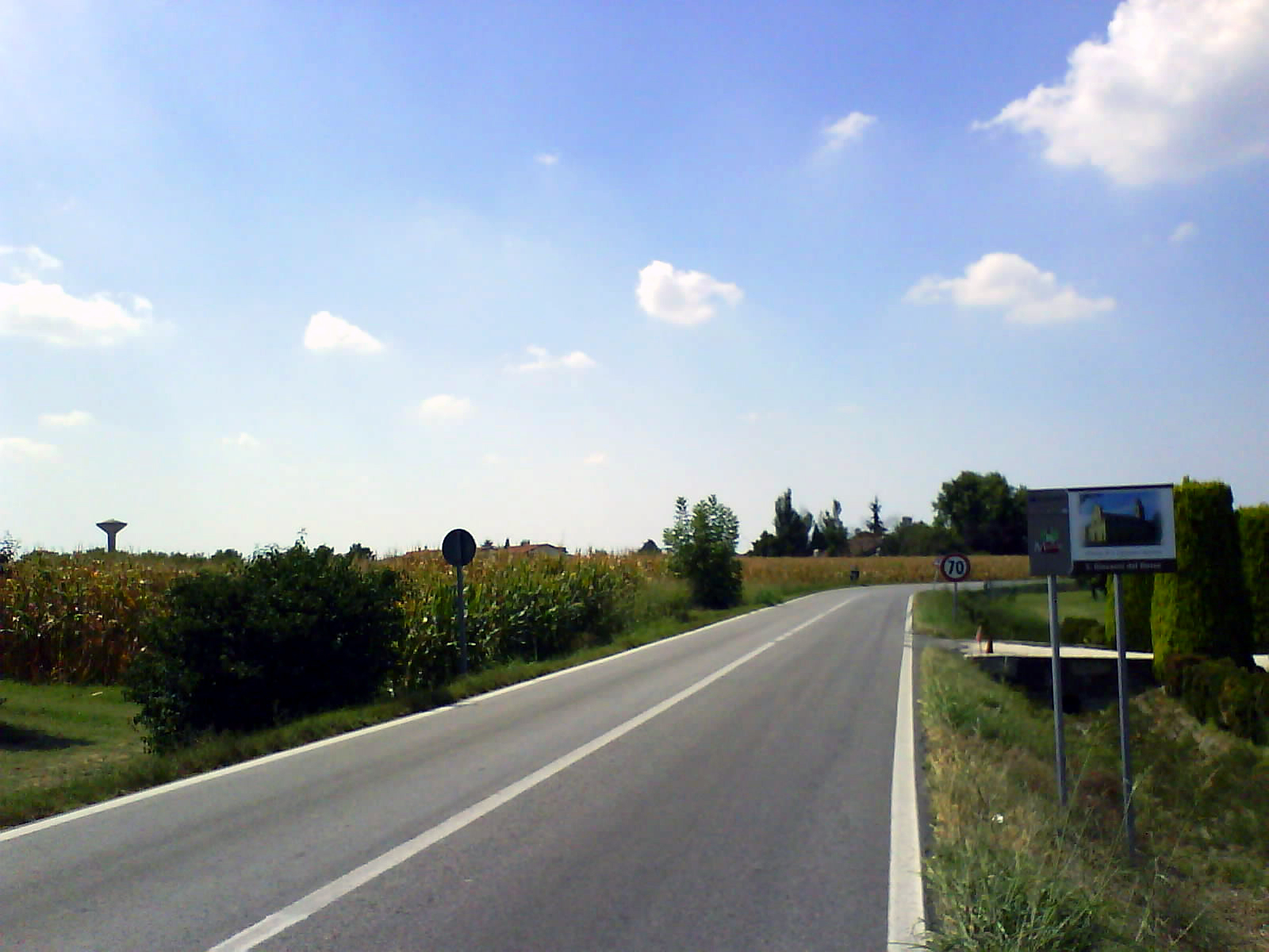 Strada SS496 a San Giovanni del Dosso